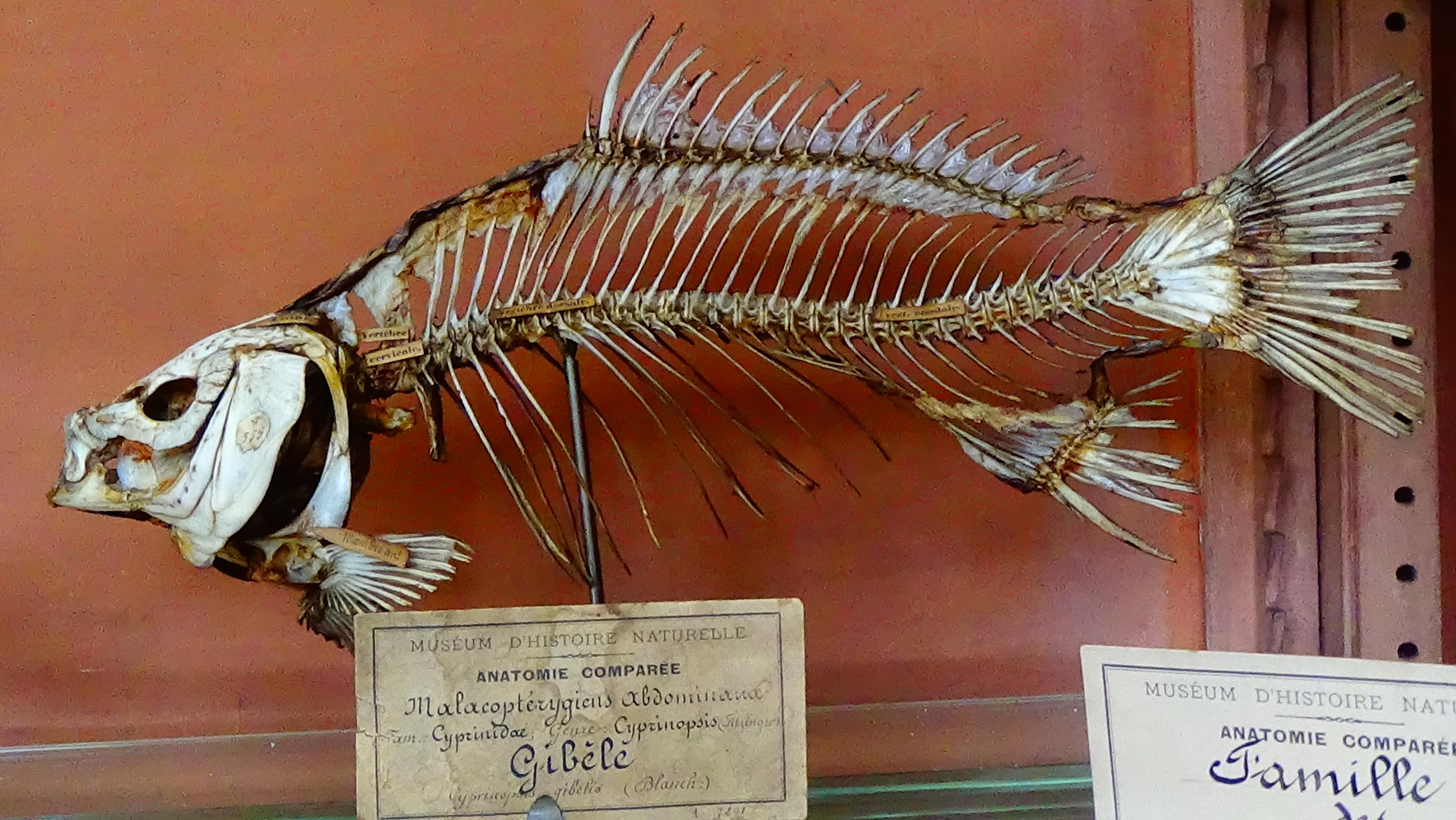 Carassius gibelio - Cyprinopsis gibelio - squeletteMNHN